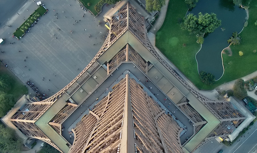 Foto von der Spitze des Eiffelturms